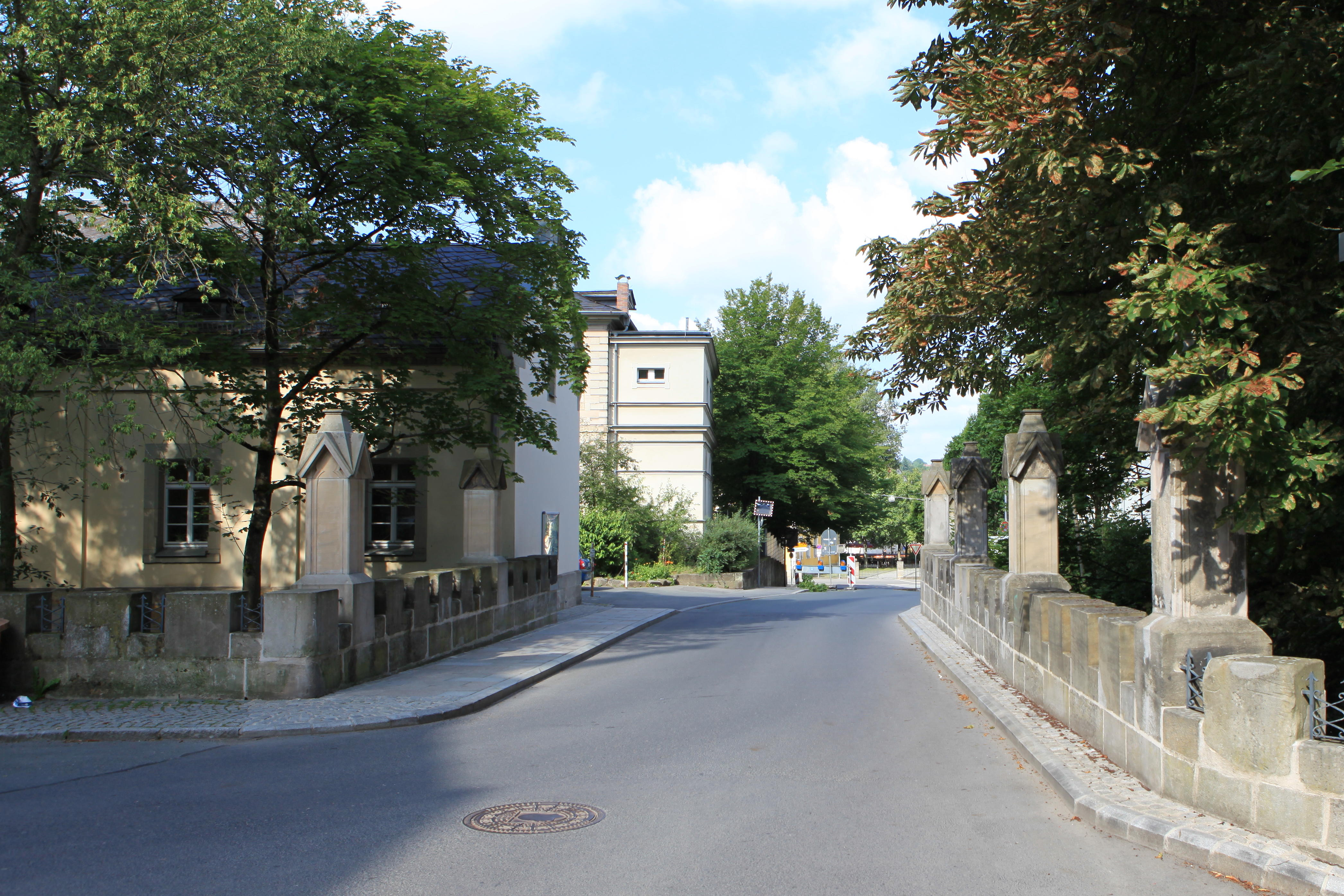 Bürglaßbrücke, Festungsstraße in Coburg